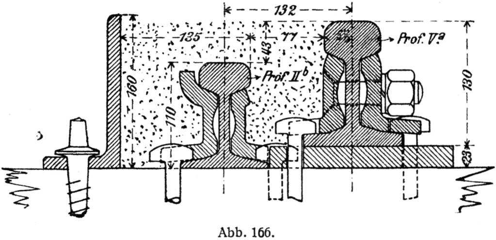 Sandgleis (Fahrschienen)